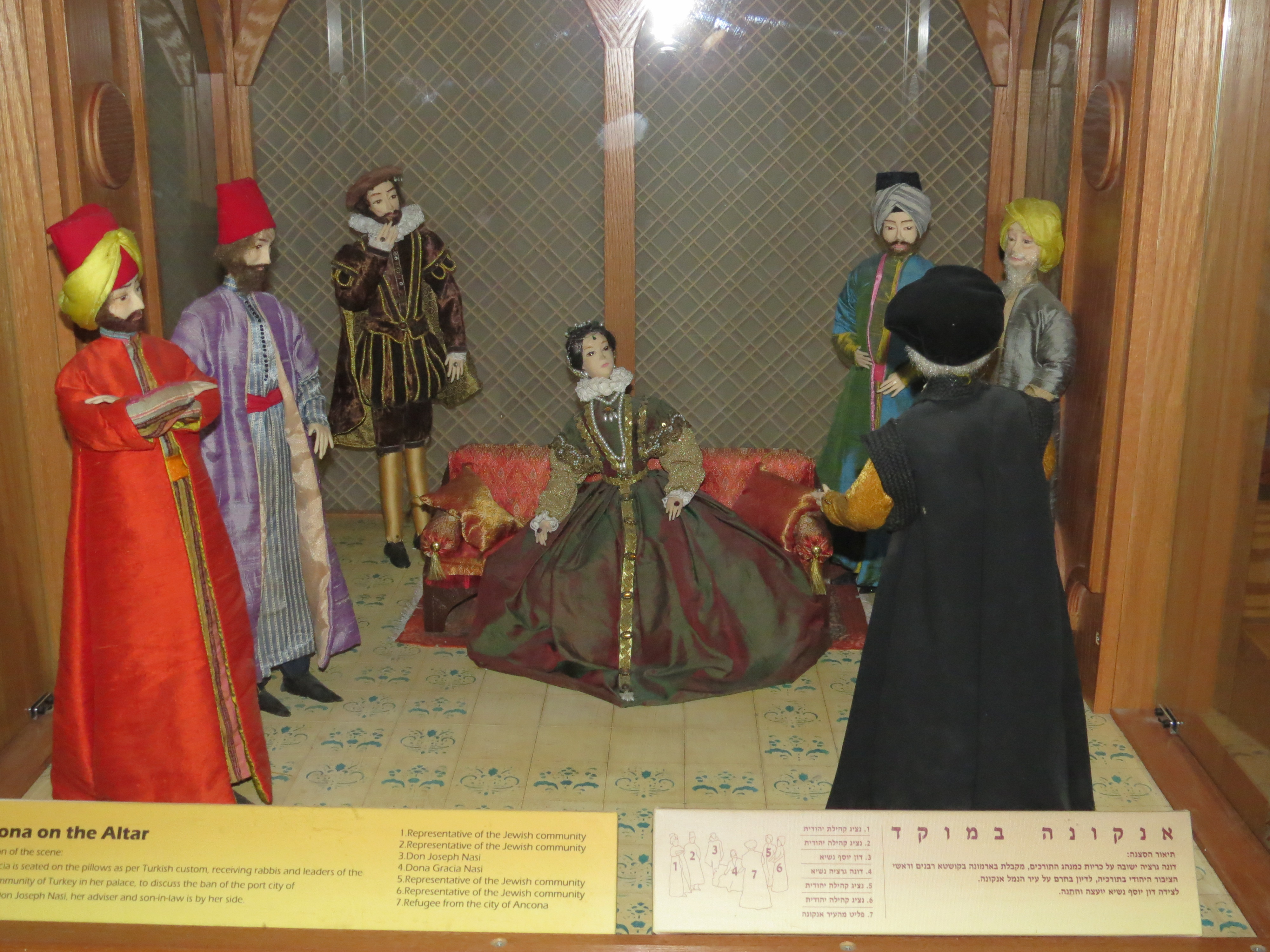 מלון ומוזיאון דונה גרציה טבריה